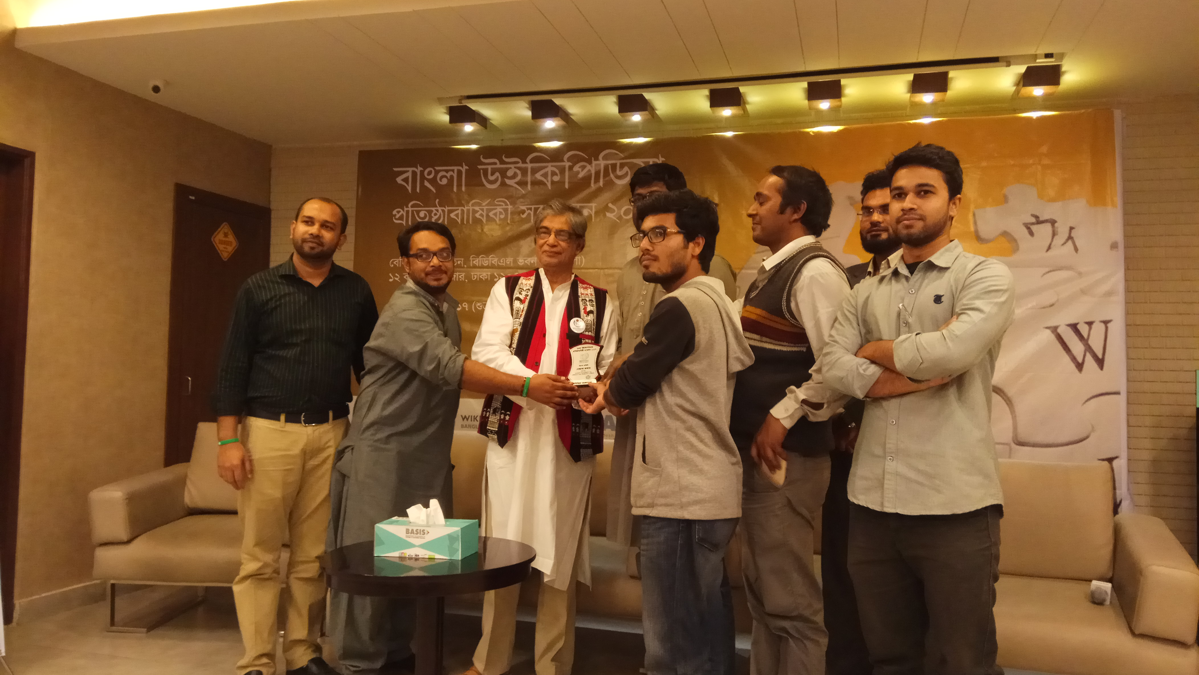 বাংলা উইকিপিডিয়ার ১৩তম প্রতিষ্ঠাবার্ষিকী উদযাপন পর্বে প্রধান অতিথি মোস্তাফা জব্বারকে উইকিমিডিয়া বাংলাদেশের পক্ষে ক্রেস্ট প্রদান।